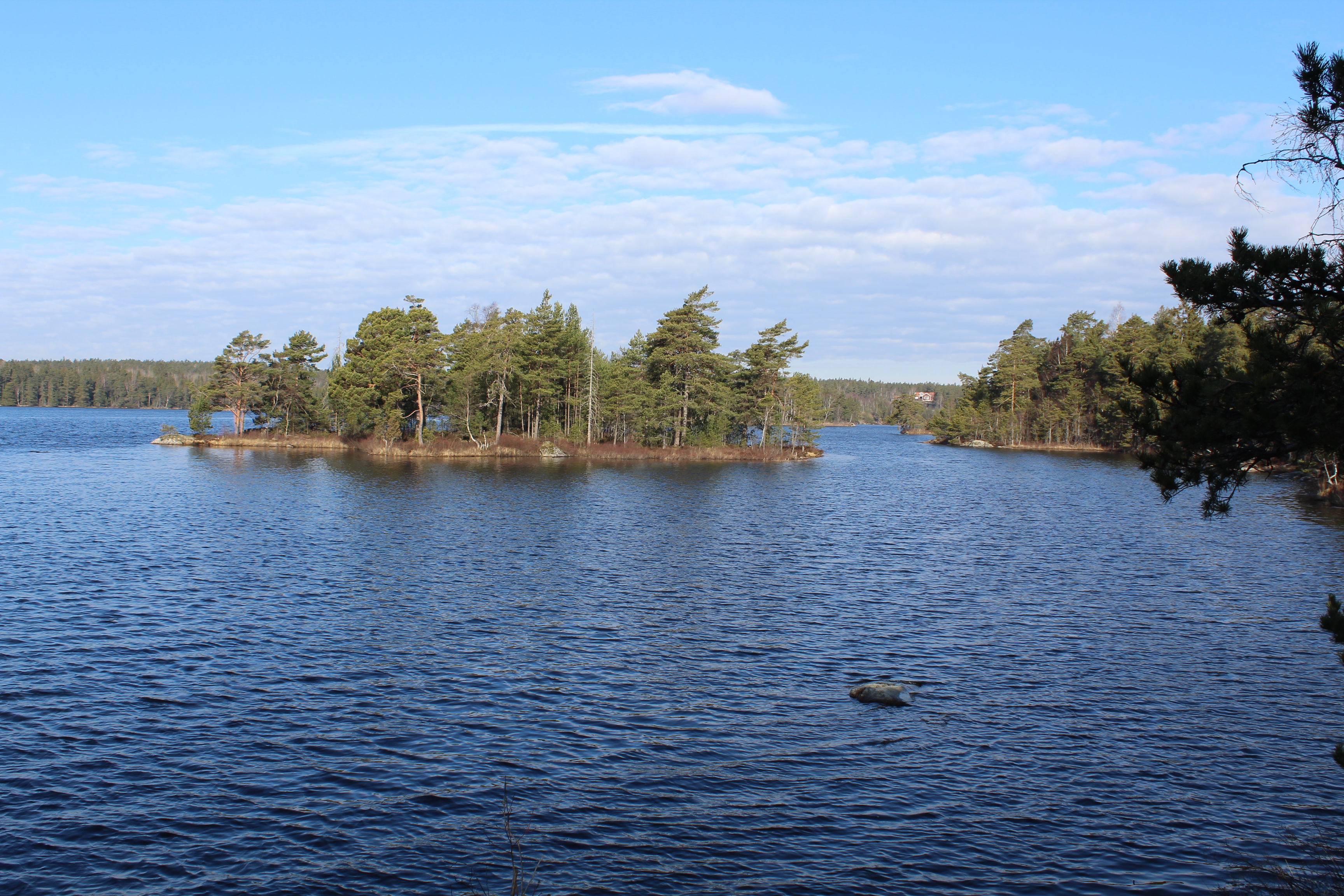 Sjön Öran, Haninge kommun och Huddinge kommun